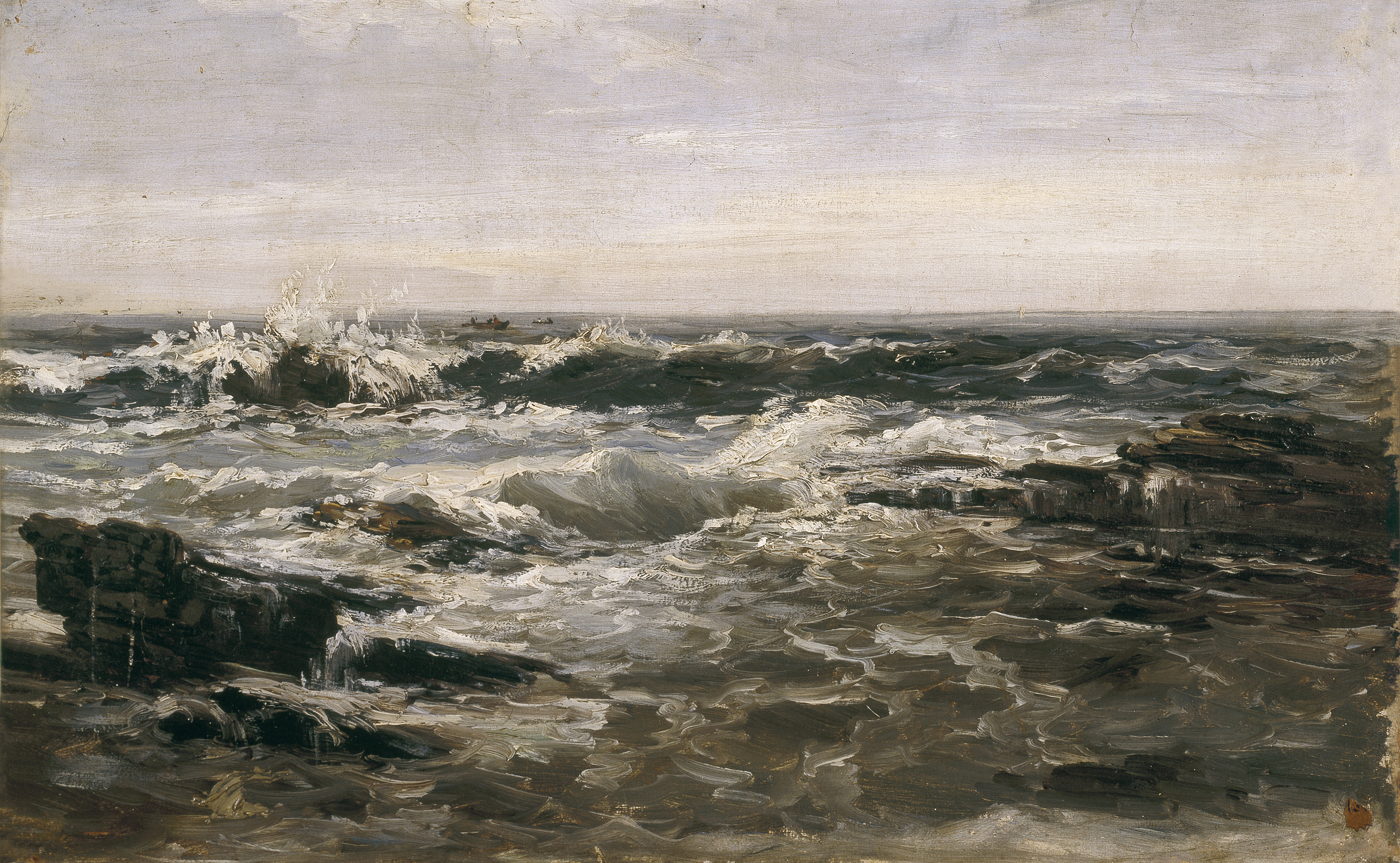 Un mar embravecido bate las rocas de la orilla formando olas cuyas crestas espumosas avanzan hacia la orilla. Al fondo y a la izquierda, se divisan dos pequeñas embarcaciones de pescadores y sobre la línea del horizonte un cielo sereno (Gutiérrez Márquez, A., Carlos de Haes en el Museo del Prado 1826-1898, Madrid, 2002).